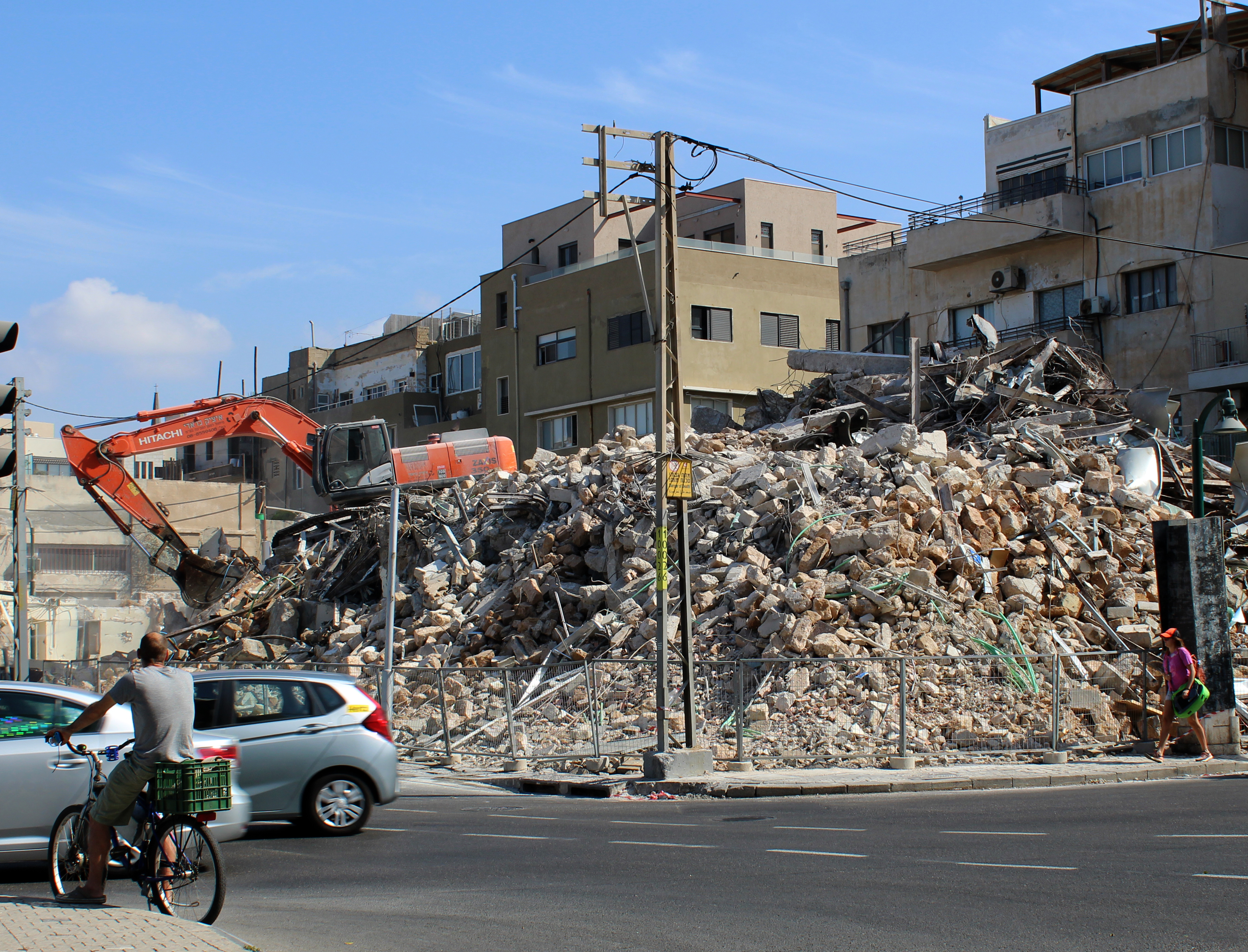 פינוי בינוי יפו